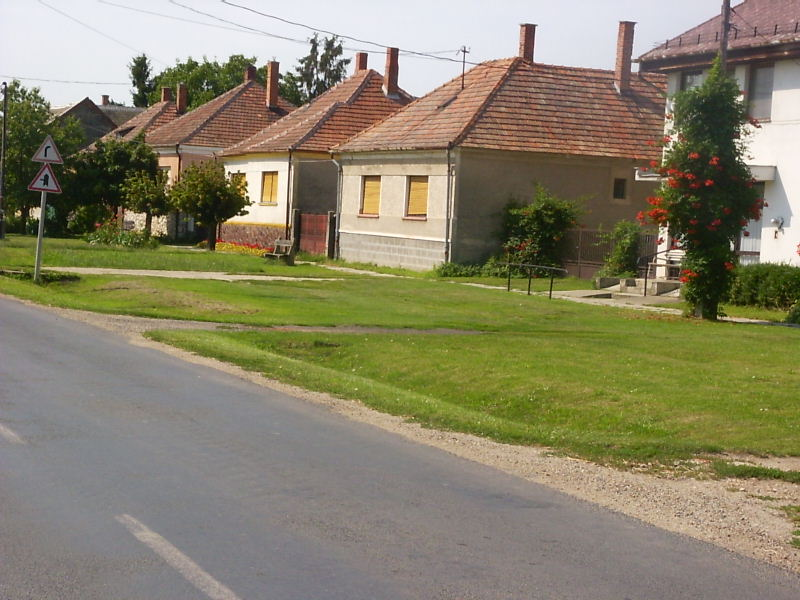 Bogyoszló utcarészlet